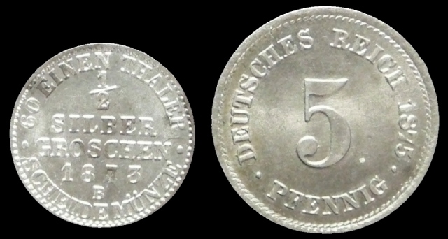 ½ Silbergroschen 1873 zu 1,098 g mit 0,242 g Feinsilber und 5 Pfennig 1875 zu 2,5 g Kupfer-Nickel-Legierung Nach Einführung der Reichswährung bleiben gemäß Artikel 15 Nr. 3 Münzgesetz vom 09. Juli 1873 die Nominale - 2½ Silbergroschen zum Wert von 25 Pfennig - 2 Silbergroschen zum Wert von 20 Pfennig - 1 Silbergroschen zum Wert von 10 Pfennig - ½ Silbergroschen zum Wert von 5 Pfennig Zahlungsmittel an Stelle der Reichsmünzen bis zur Außerkurssetzung ab 01. Juni 1876 zum gleichen Wert. Der Umtausch musste bis 31. August 1876 an den Kassen der Bundesstaaten erfolgen, die diese Münzen geprägt haben oder in deren Gebiet dieselben Zahlungsmittel sind.